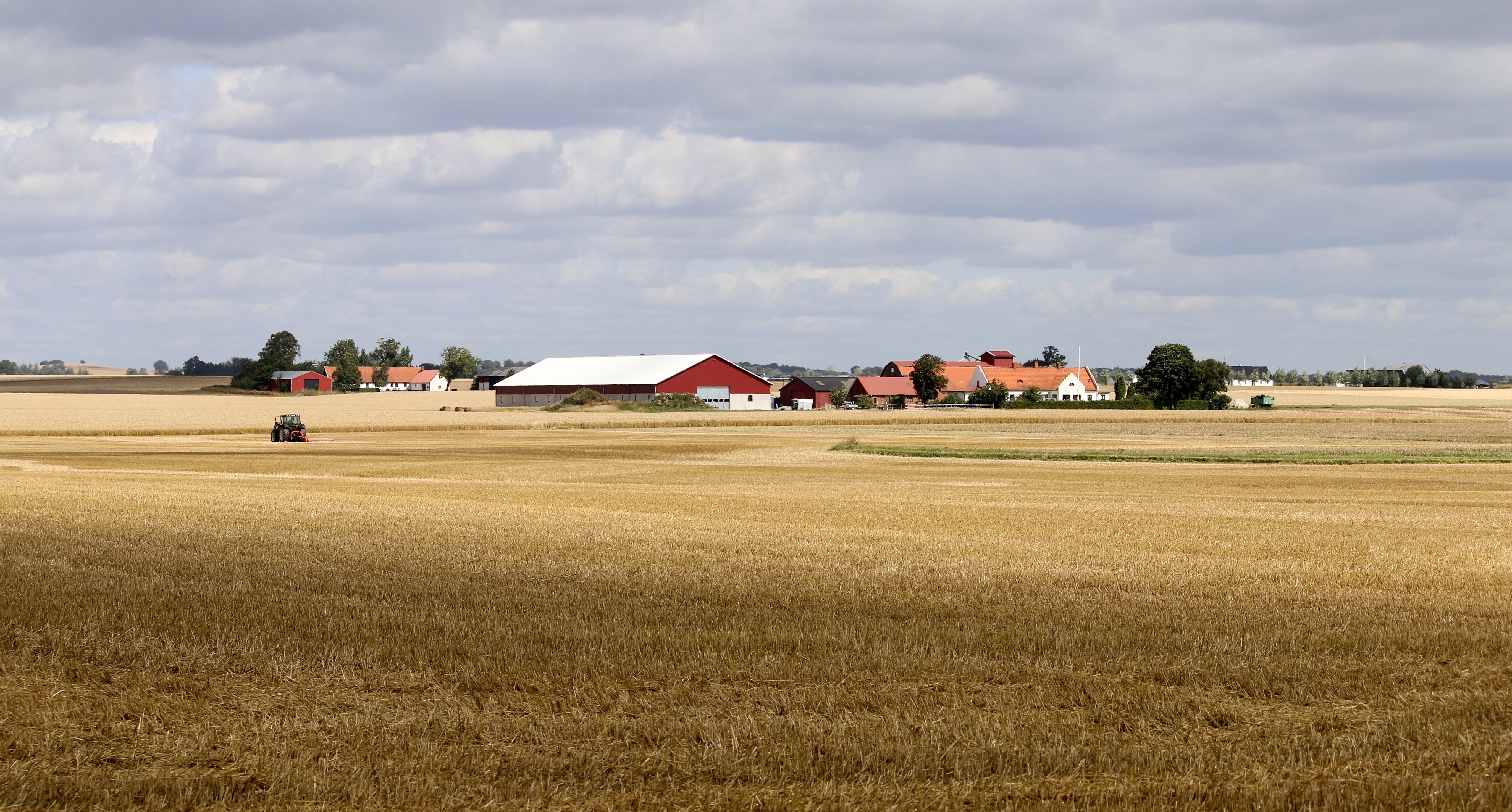 Gård på Söderslätt